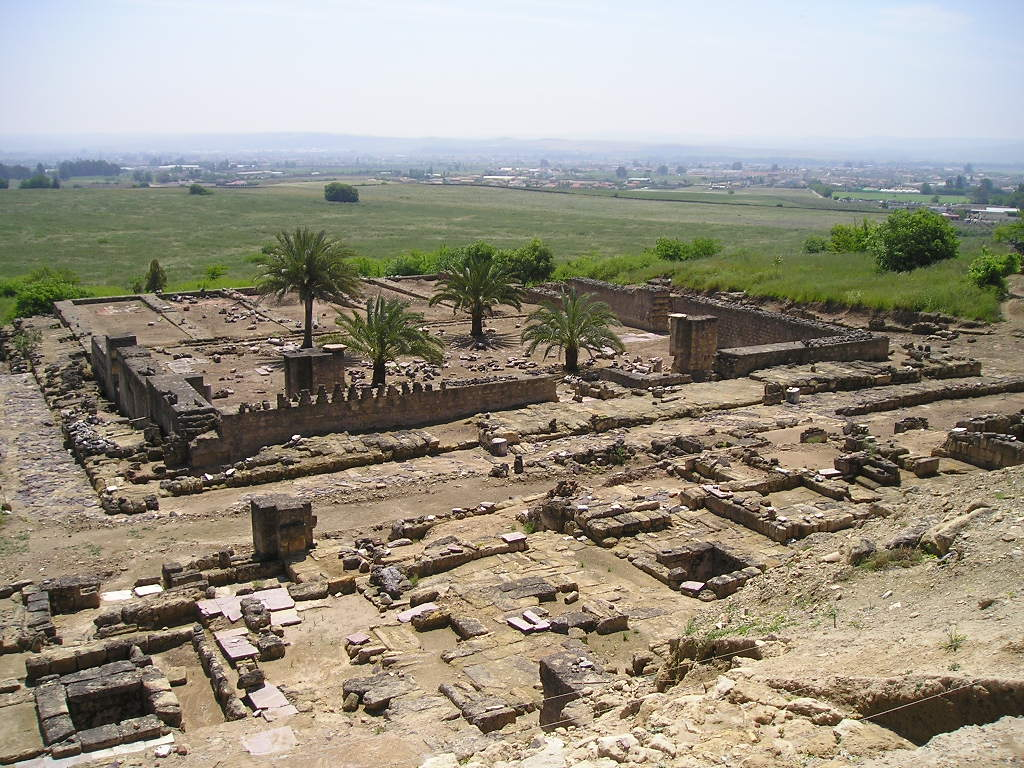 Mezquita Aljama del conjunto arqueológico de Medina Azahara Yo soy la autora de esta fotografía Autora: Dolores Mª Macías Naranjo